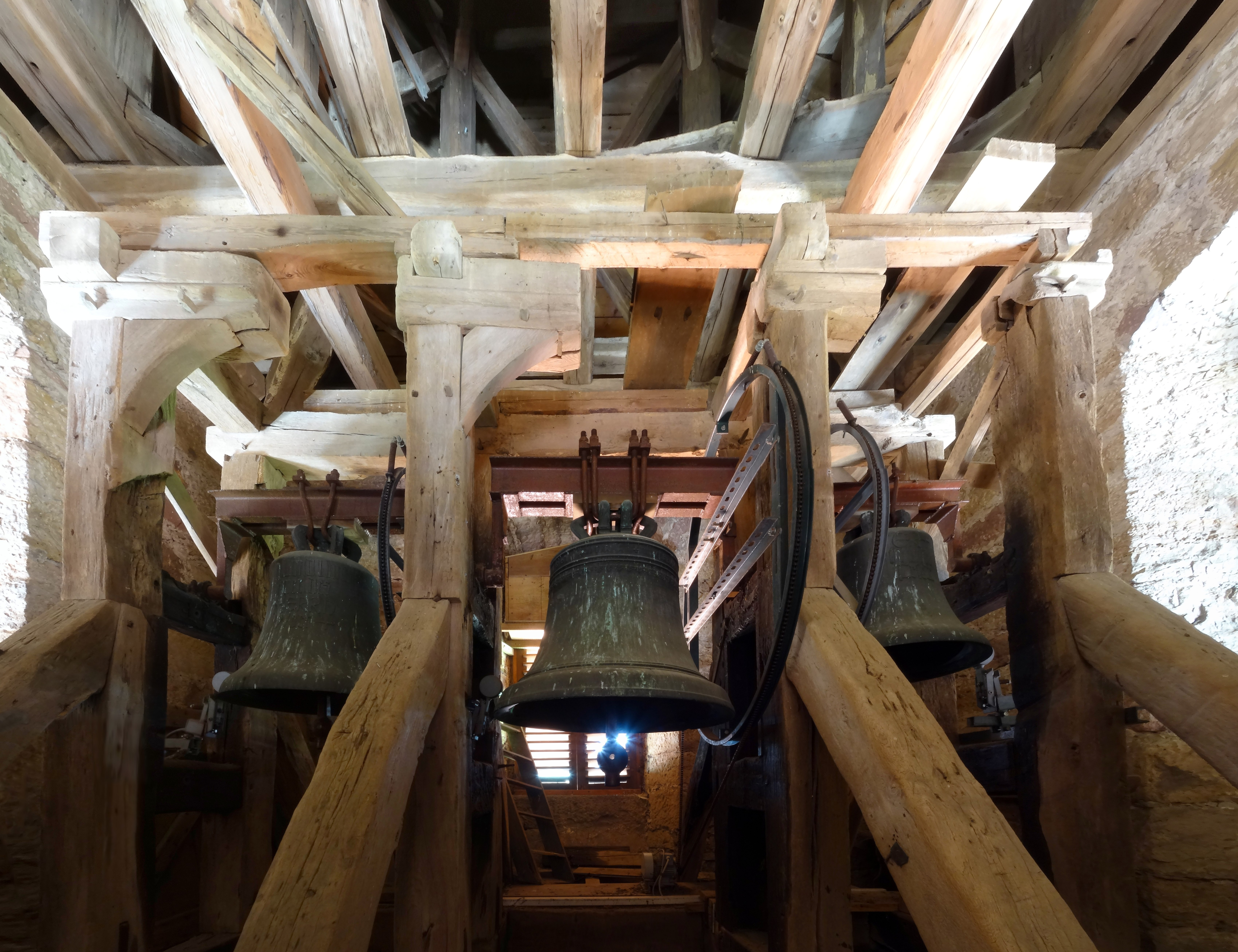 Dom der Rhön, Glockenspiel